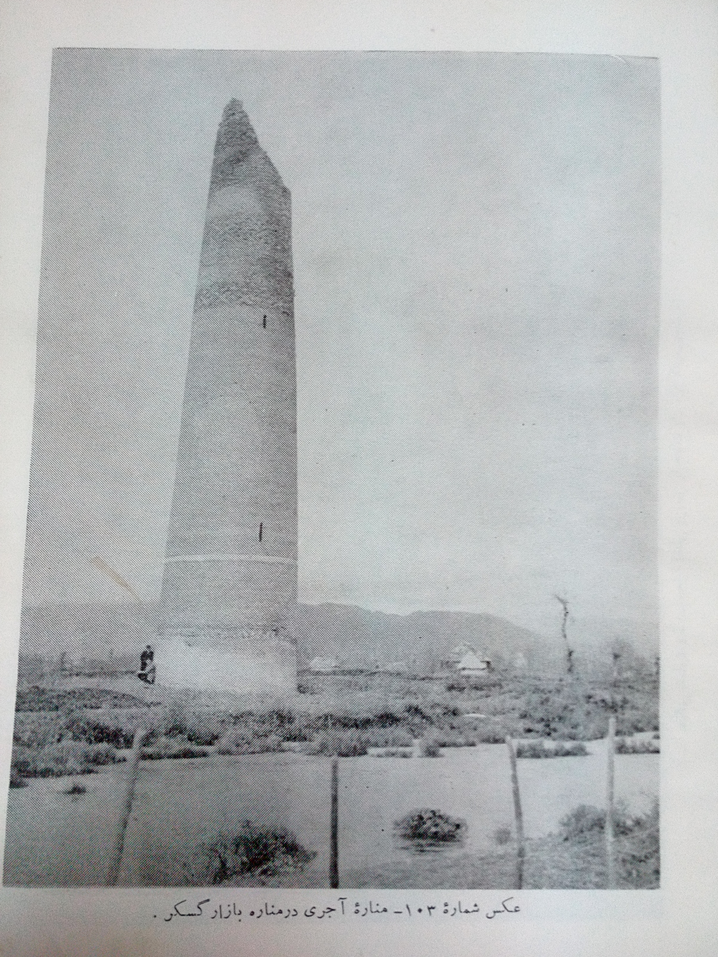 این تصویر نشان دهنده بلندی مناره قبل از فروریختن آن بر اثر زلزله